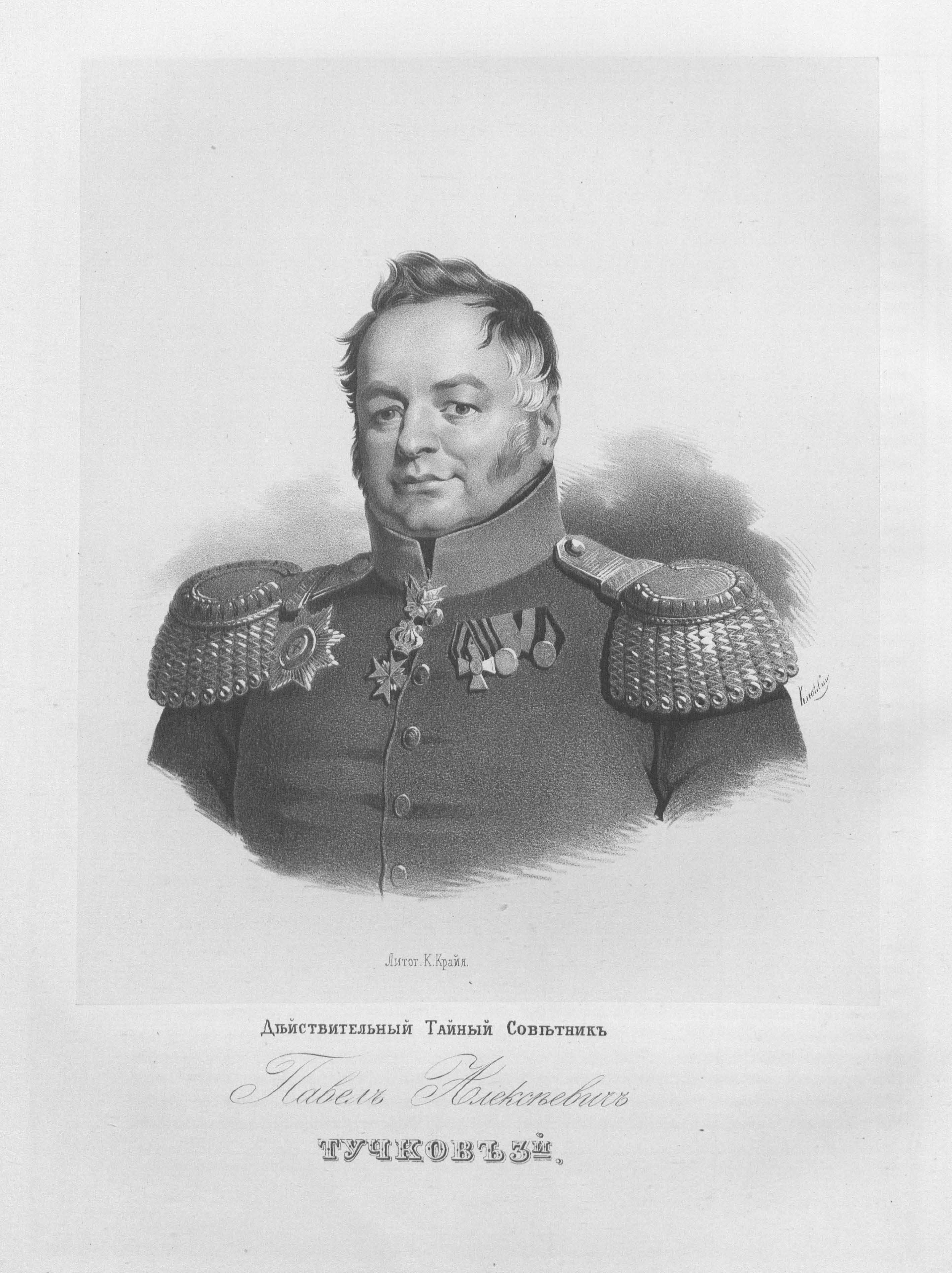 Действительный тайный советник Павел Николаевич Тучков